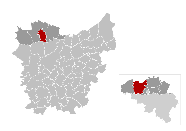 Lec'hiañ Kaprijke, Belgia.